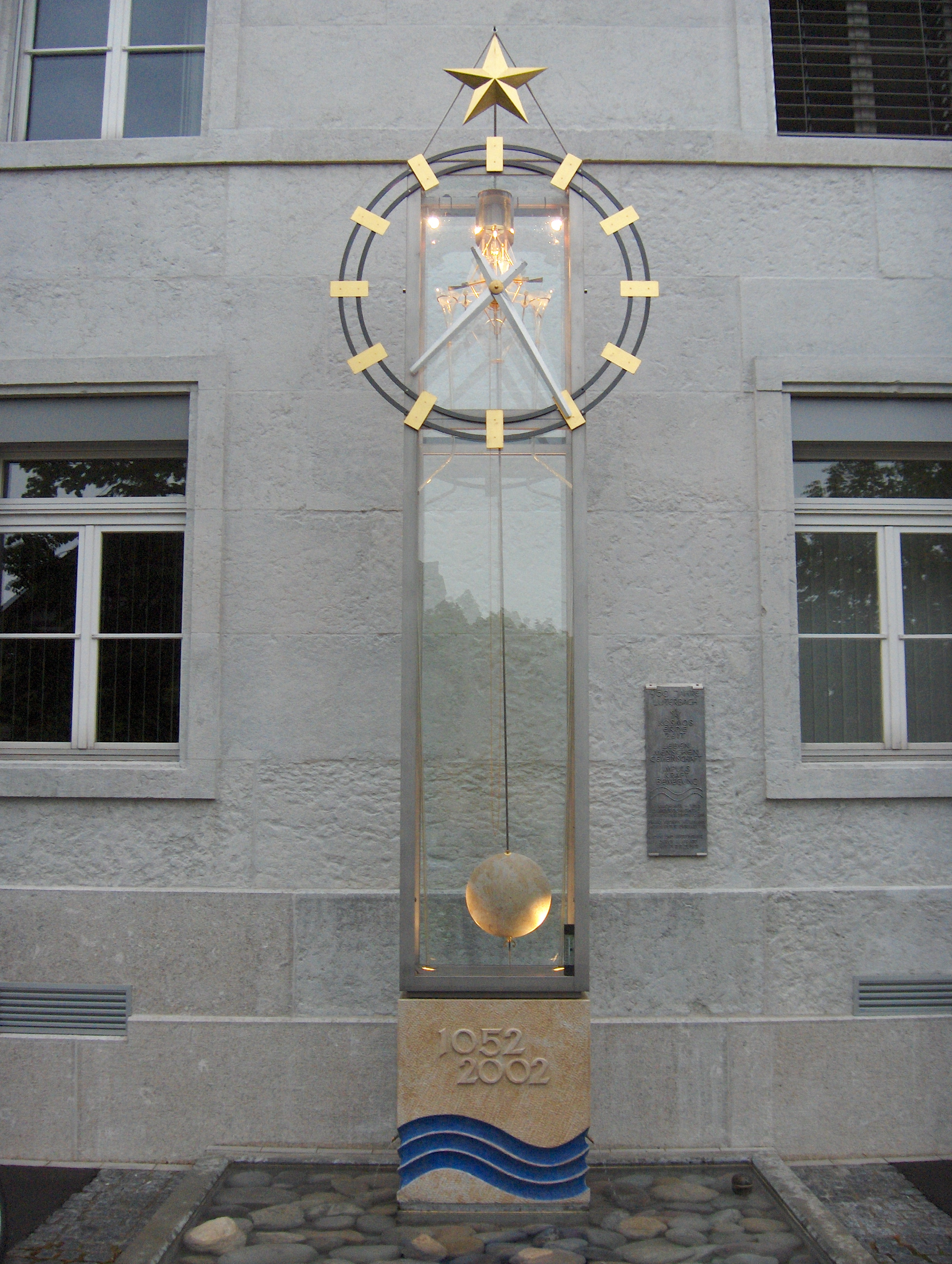 Wasseruhr vor der Gemeindeverwaltung Luterbach